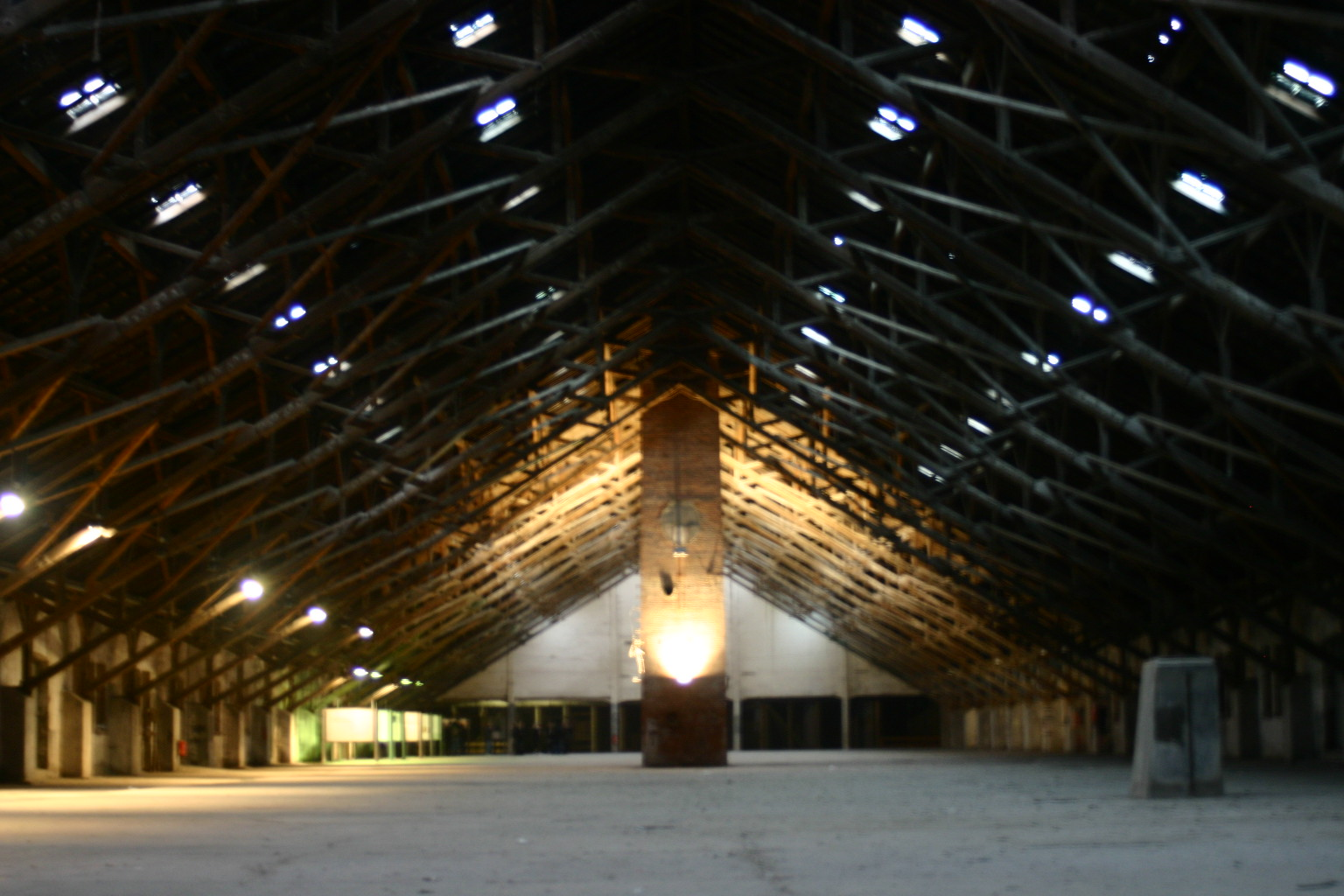 Rechter Flügel des Klinkerwerkes in Neuengamme